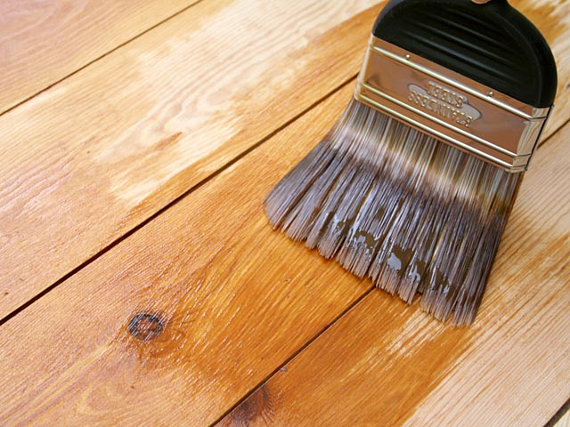 Aplicado a brocha de una capa de barniz Aplicación de barniz